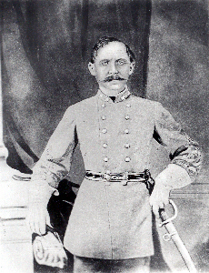 Offizier und Oberst der 1. Texas Cavalry Augustus Carl Büchel